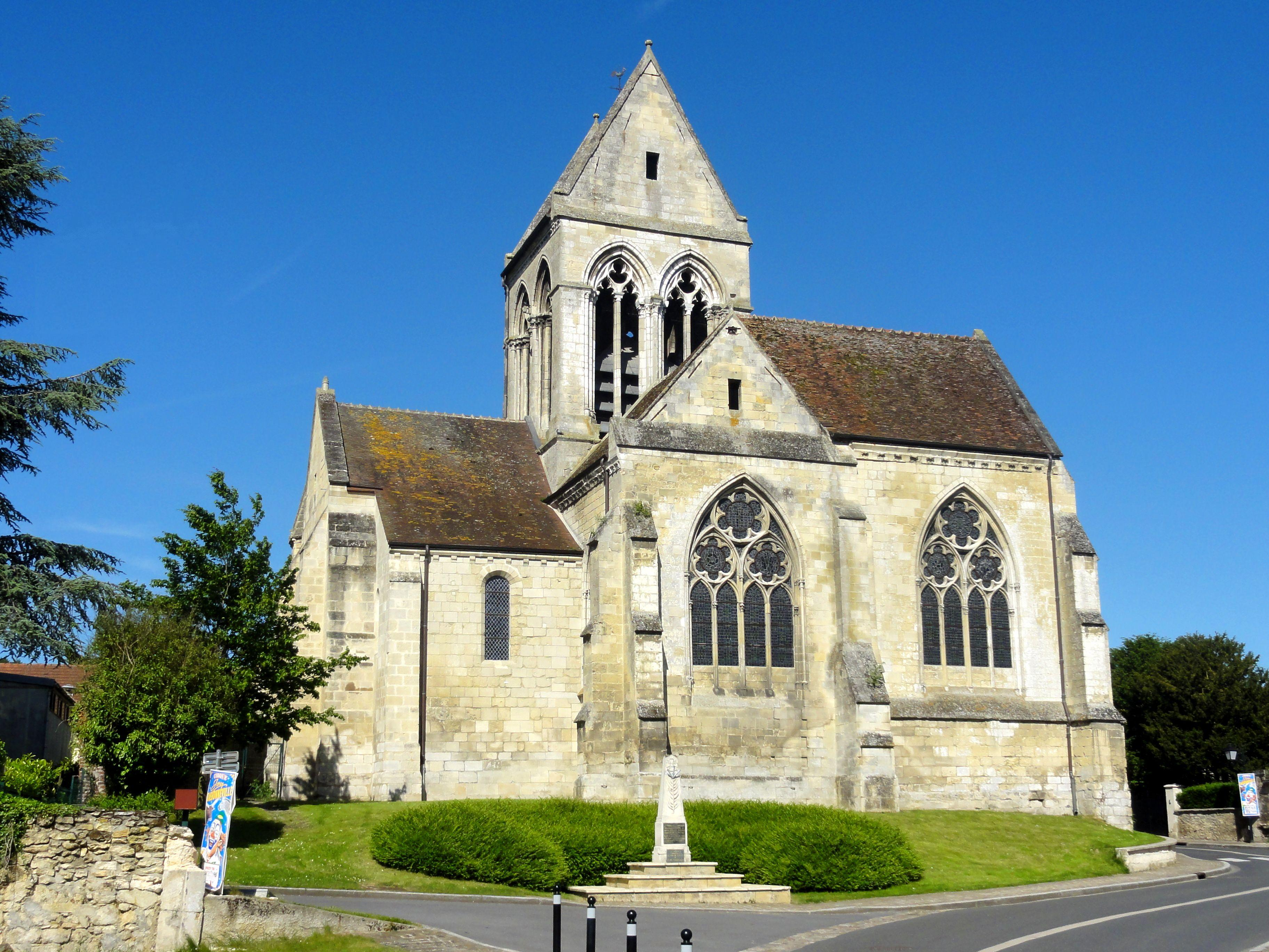 La façade orientale.